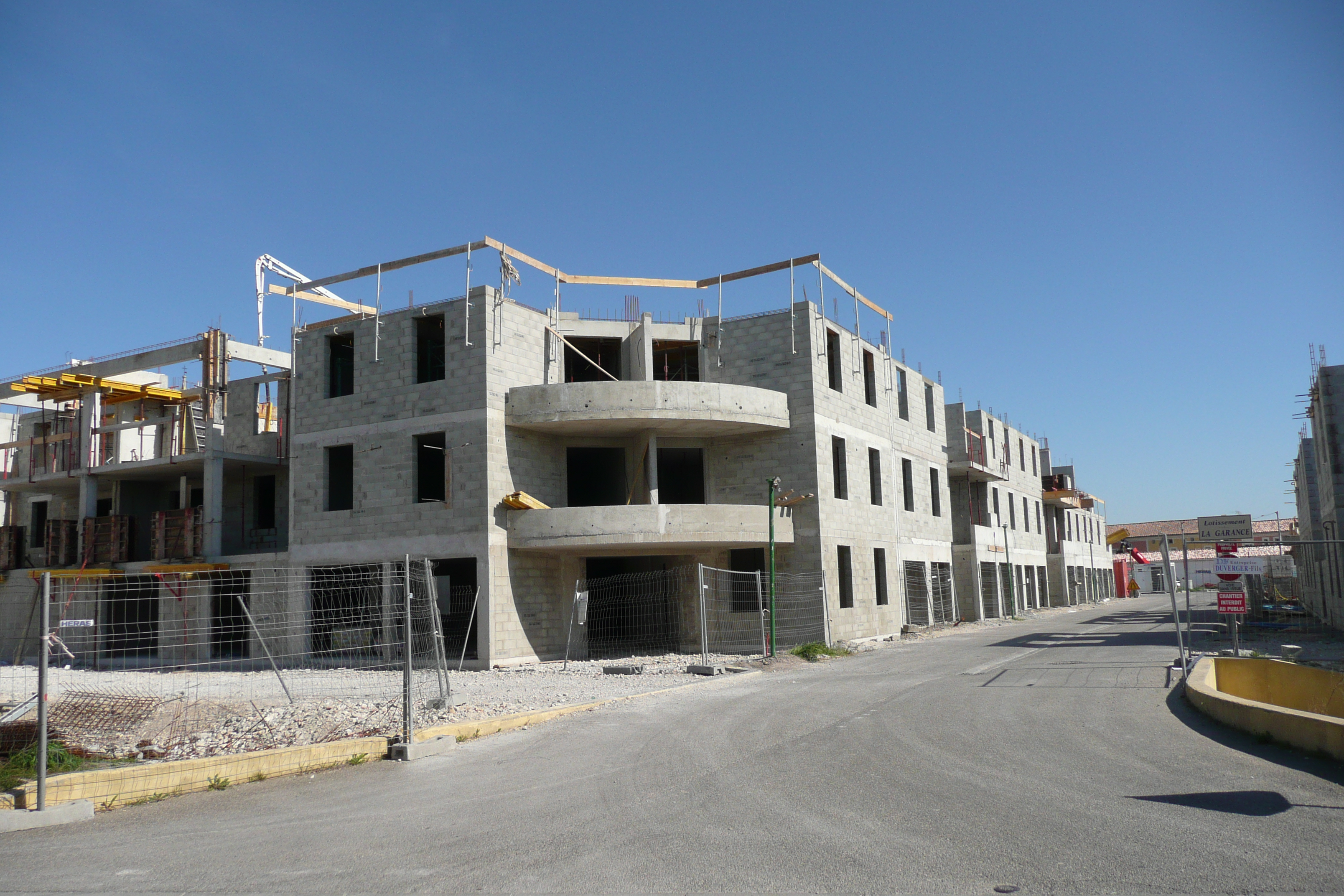 Lotissement la Garance le 20 mars 2008 à Athen des Paluds.